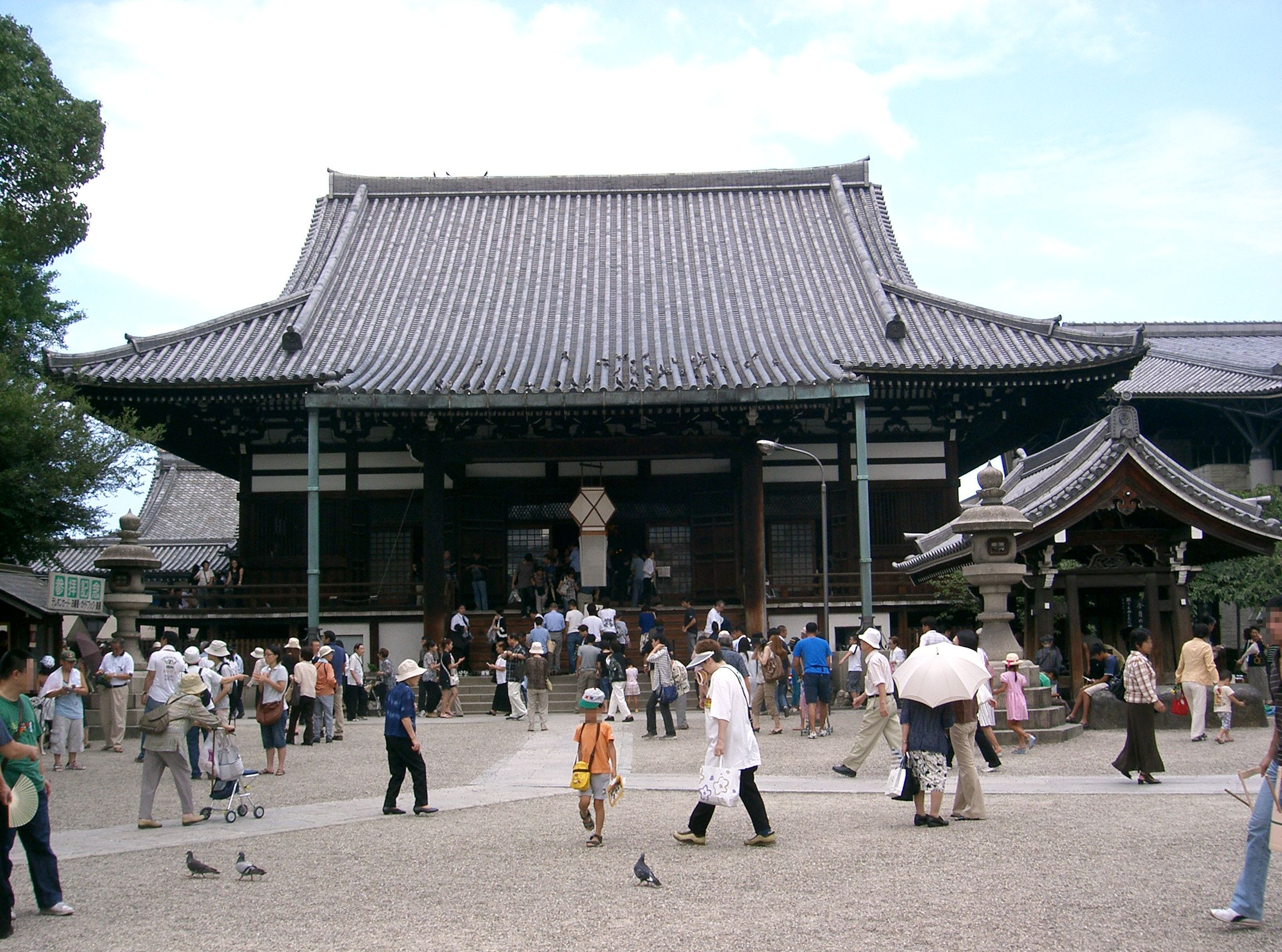 一心寺の本堂